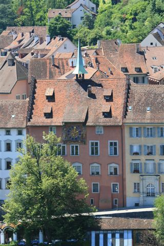 Tagsatzungssaal, Baden, Schweiz